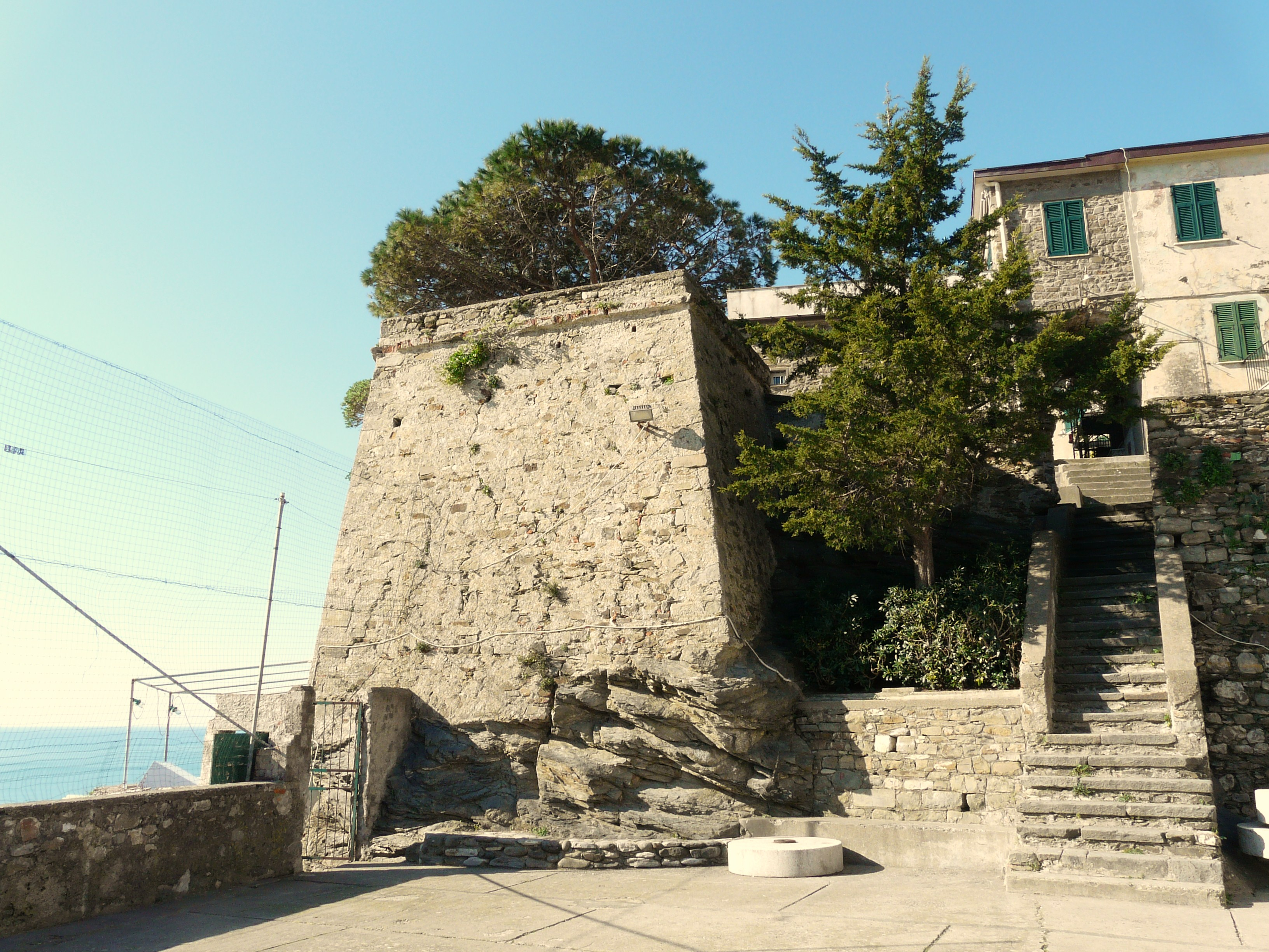 Torrione genovese, Corniglia, Cinque Terre, La Spezia, Liguria, Italia